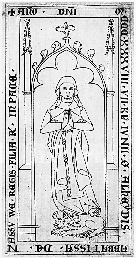 Tekening van het grafmonument van Adelheid van Nassau abdis van Klarenthal in klooster Klarenthal uit het Epitaphienbuch van Heinrich Dors